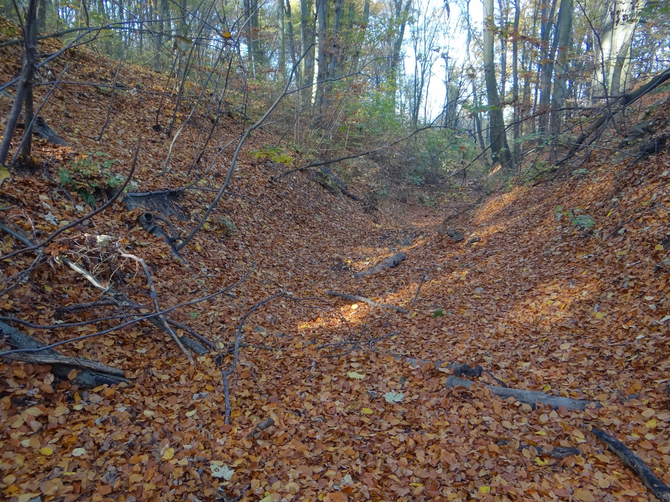 Zielony Dół w Lesie Wolskim w Krakowie